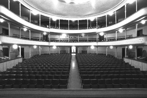 Interno del Teatro Giuseppe Verdi (Ferrara)